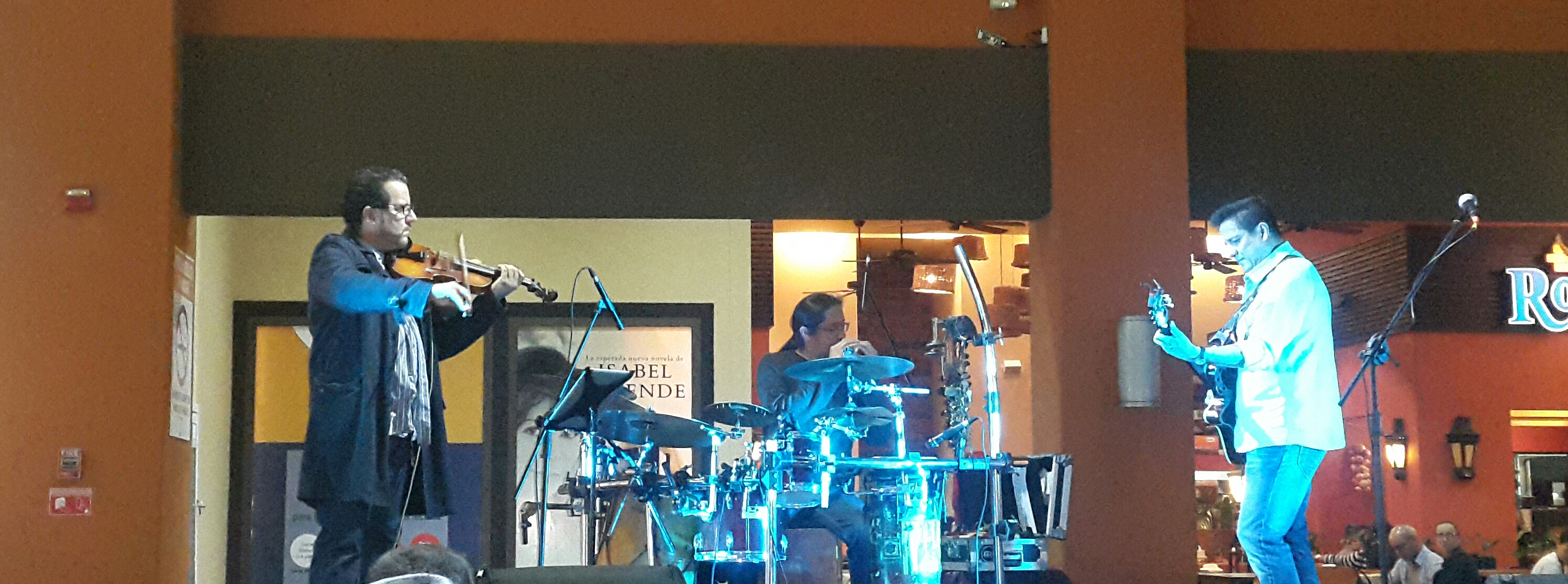 El grupo costarricense de música instrumental Éditus, conformado por Edín Solís (guitarra), Ricardo Ramírez (violín) y Carlos Vargas "Tapao" (percusión). Foto retocada para dar acercamiento a los miembros del grupo.